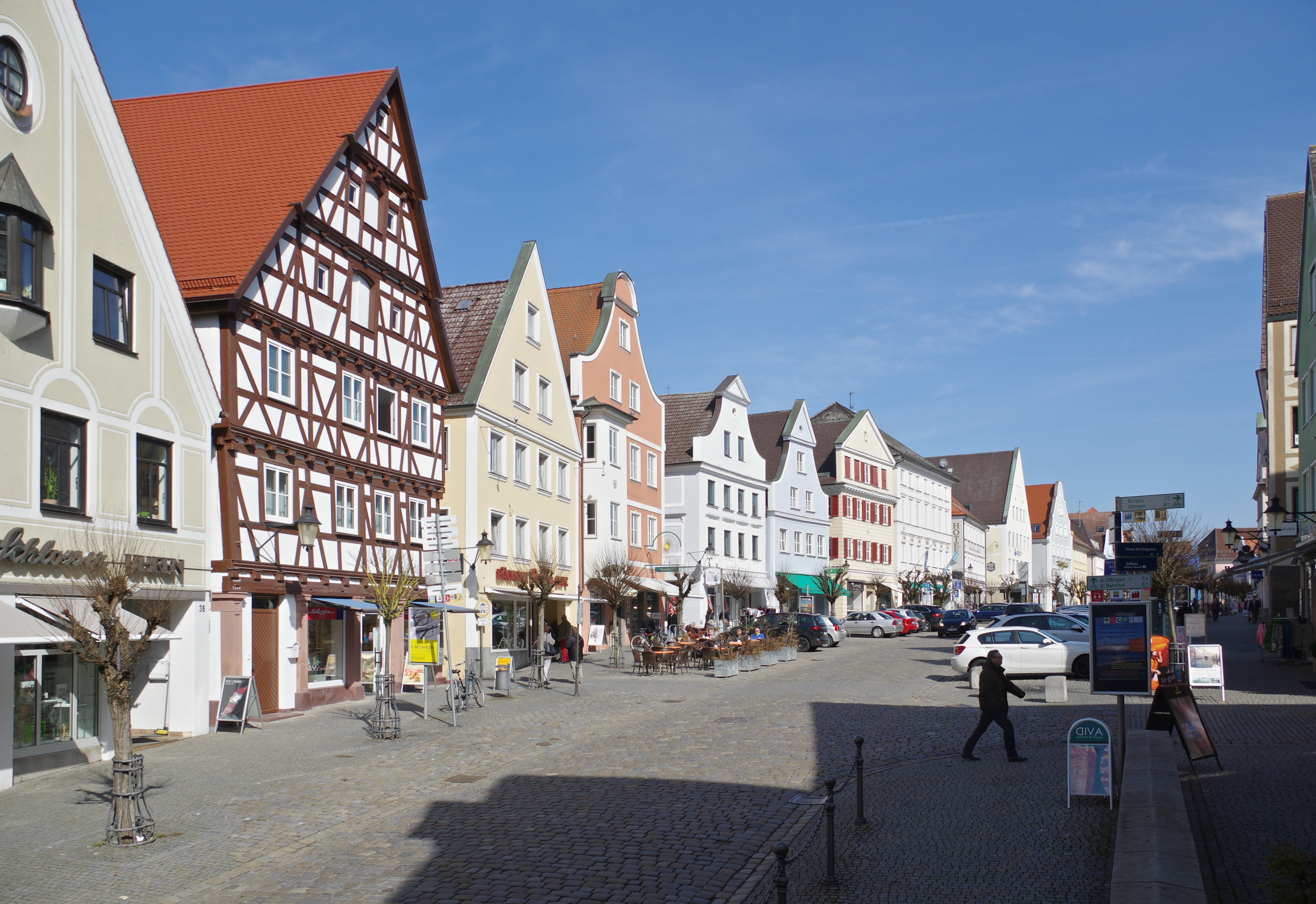 Günzburg, Marktplatz